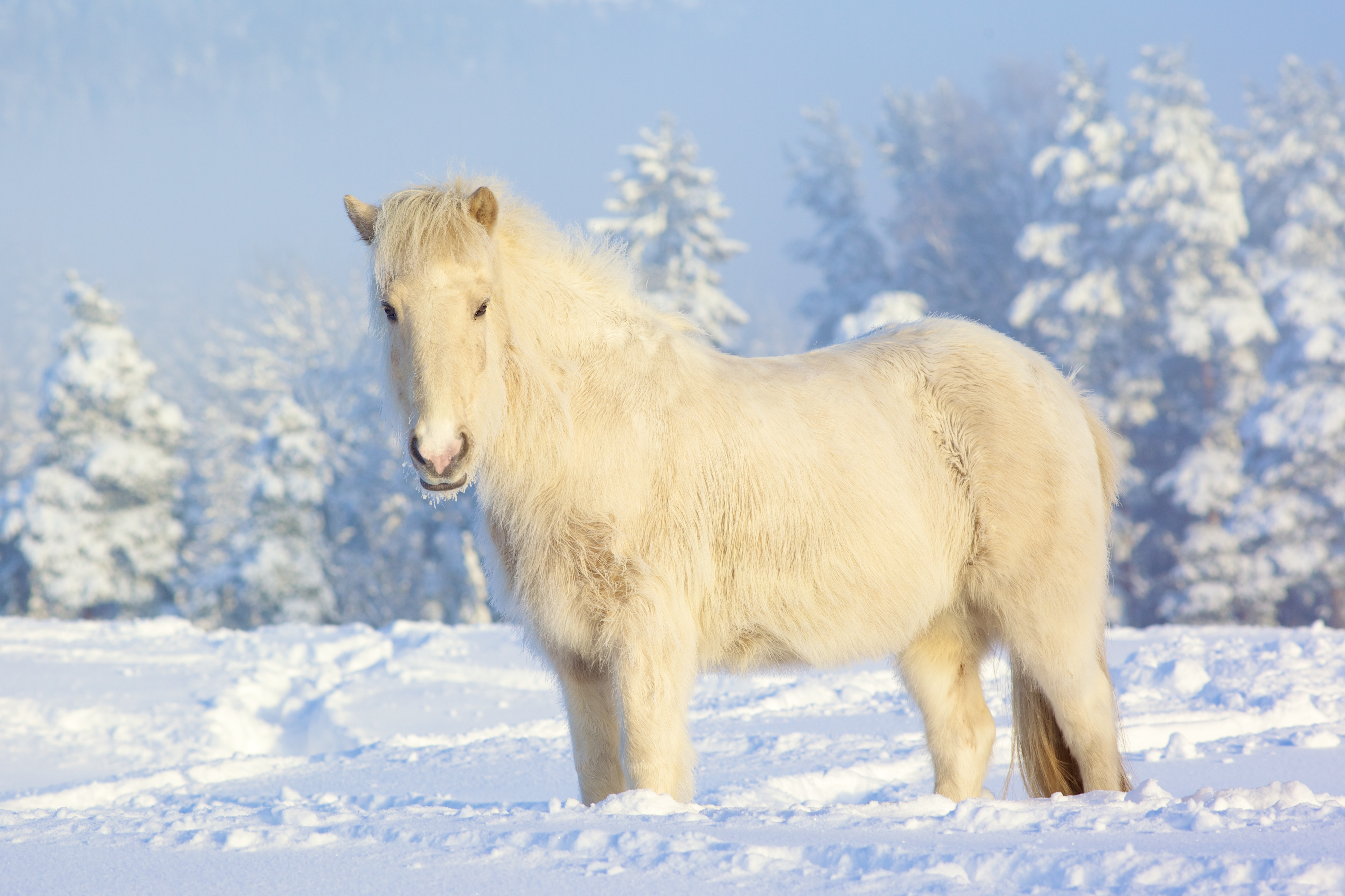 Horse in winter landscape